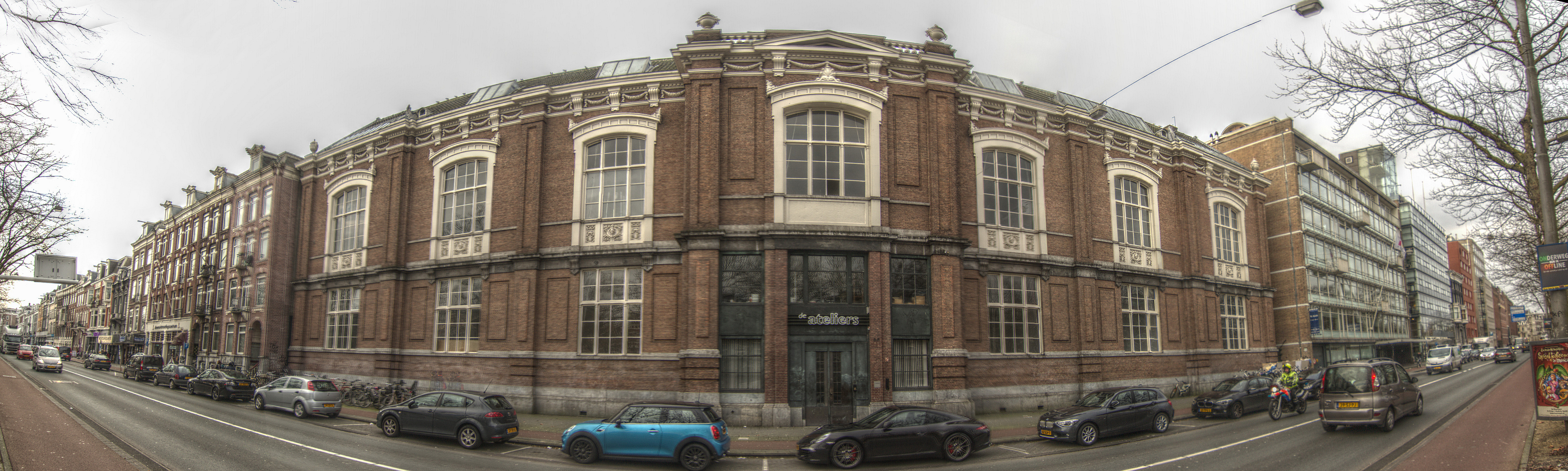 Panorama van het voormalige gebouw van de Rijksakademie voor de Kunst aan de Stadhouderskade 86